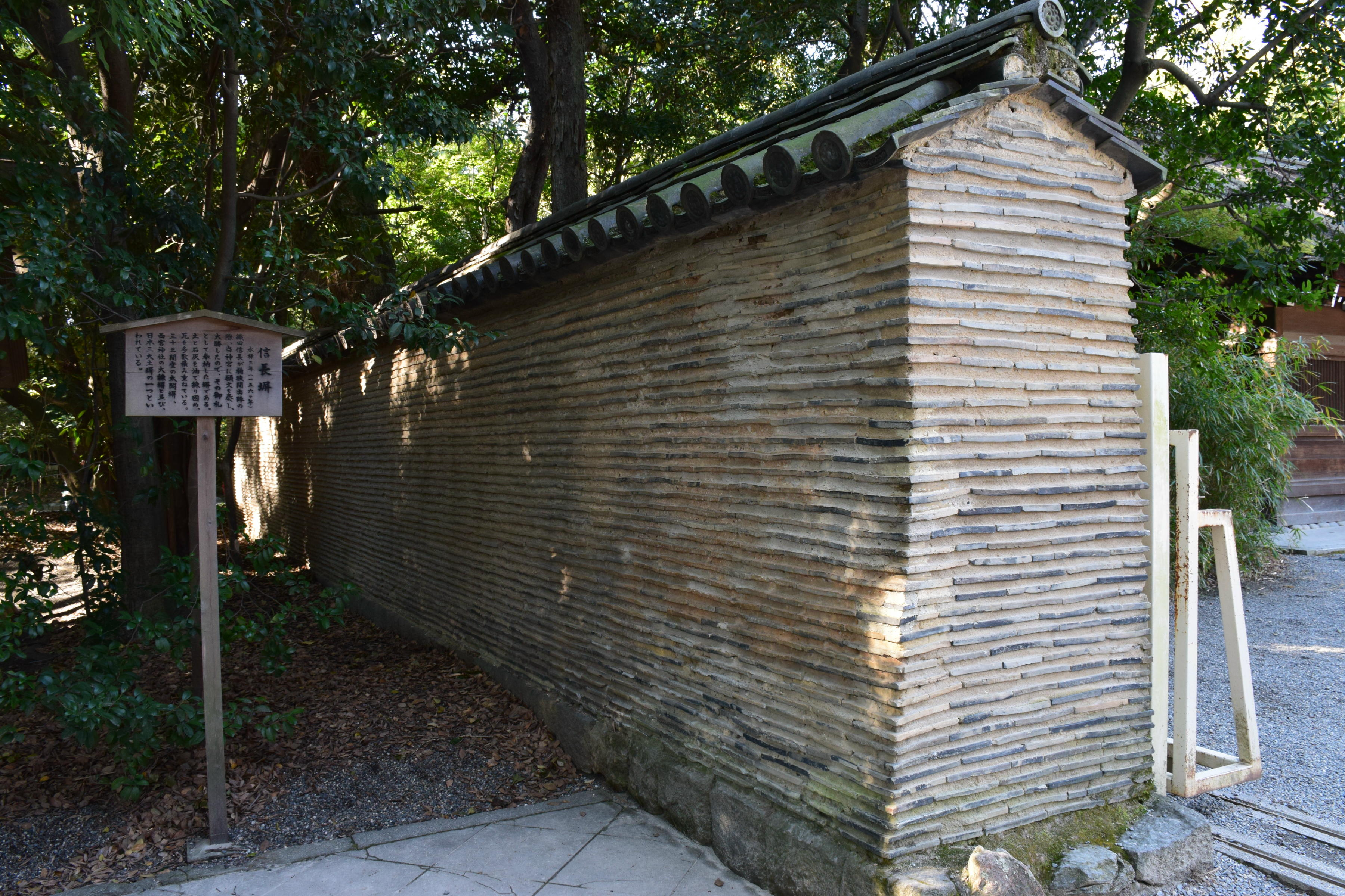 'Nobunaga-Bei